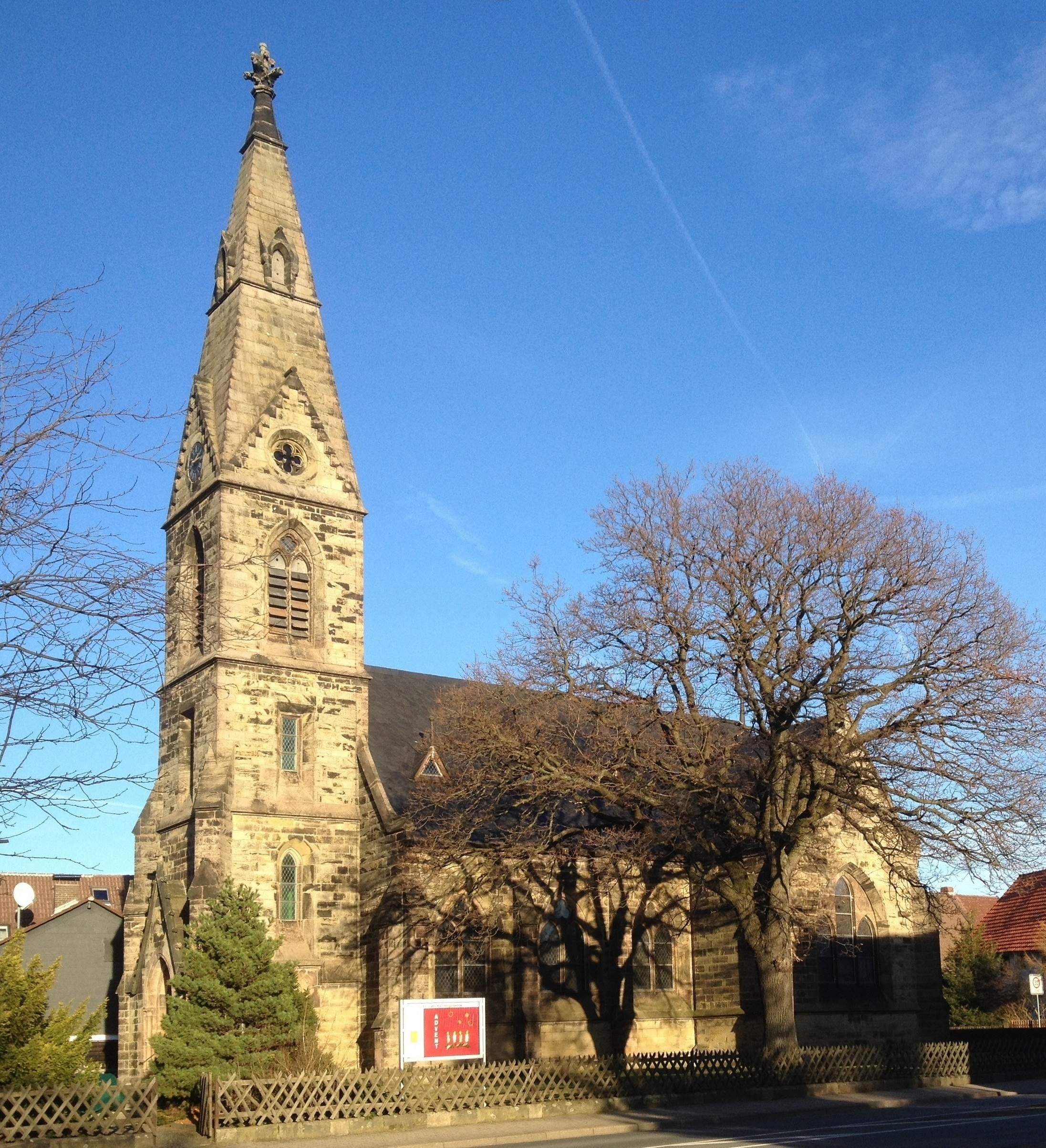 Astfeld (Langelsheim), ev.-luth. St.-Laurentius-Kirche, eingeweiht 1873